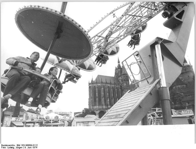 15. Arbeiterfestspiele, Domplatz, Festplatz ADN-ZB Ludwig-9.6.74 Erfurt: 15. Arbeiterfestspiele - Volksfest auf dem Domplatz